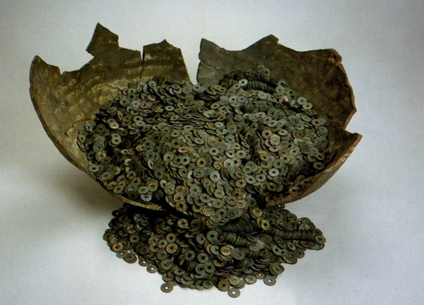 史跡志苔館跡で発掘された古銭